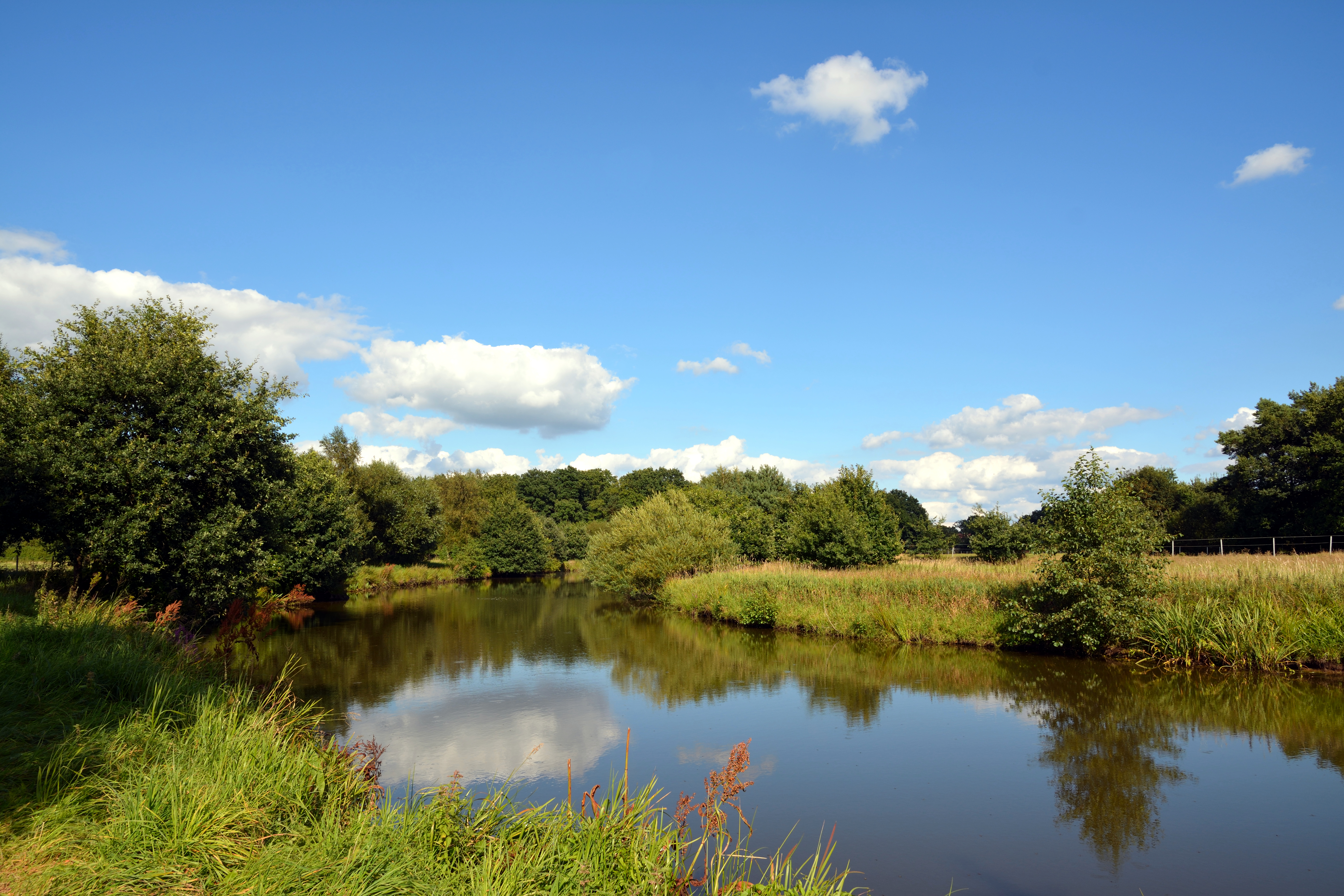 Ein Teich ohne Namen an der Stör in Störkathen.